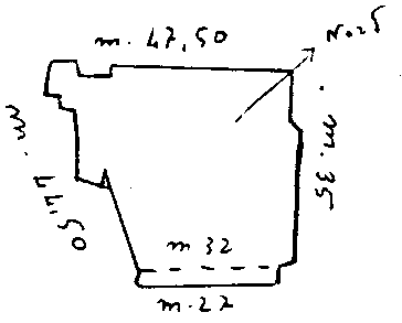 Planimetria del castello di Bivona tratta da Midulla 1981, p. 28.